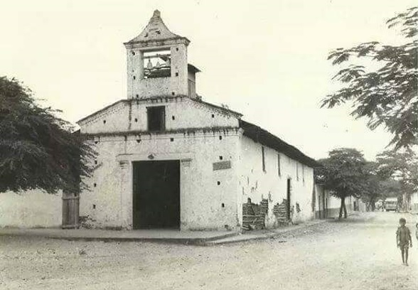 Primera Parroquia Nariño Cundinamarca.